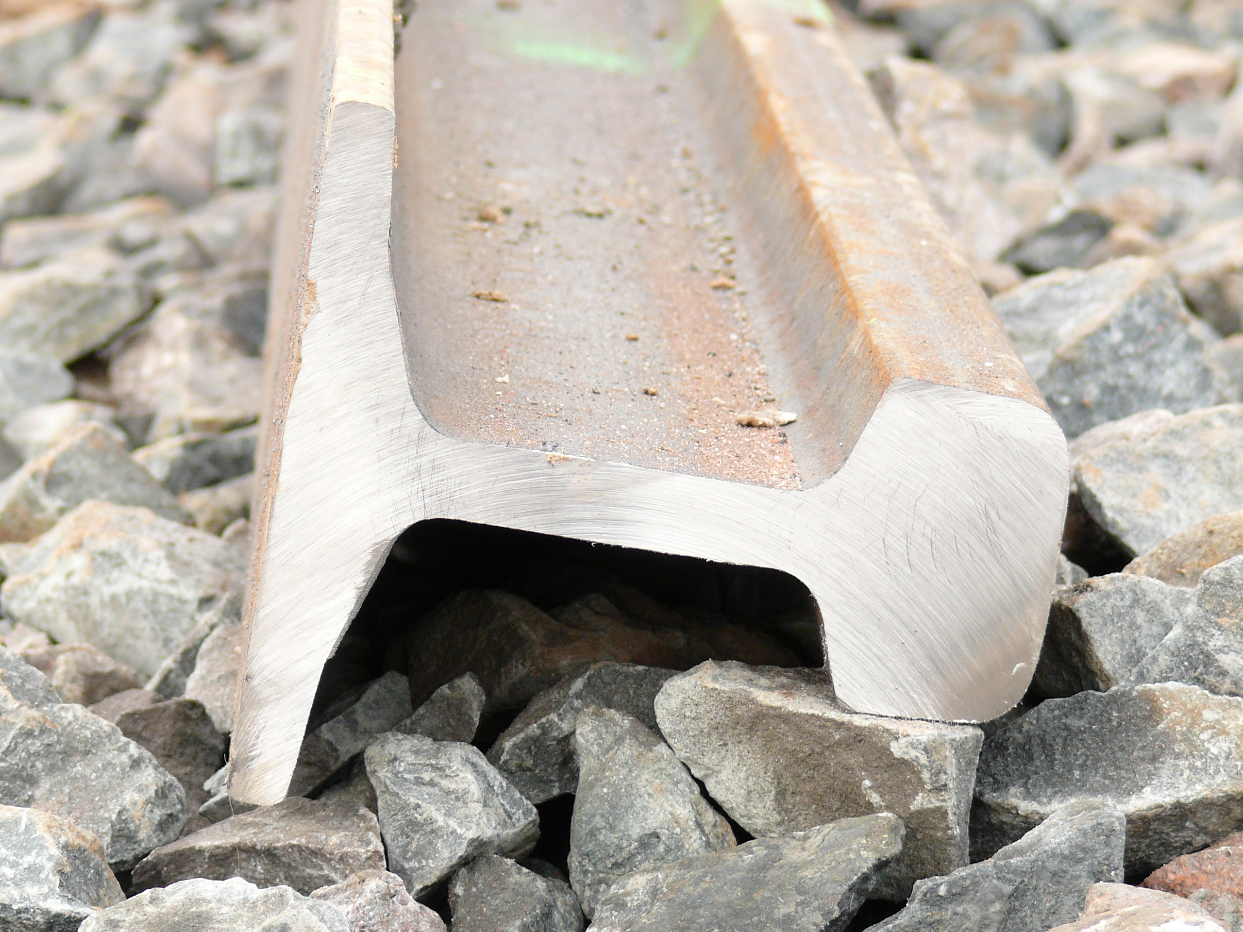 Profil du rail de la ligne de tramway express Rhônexpress